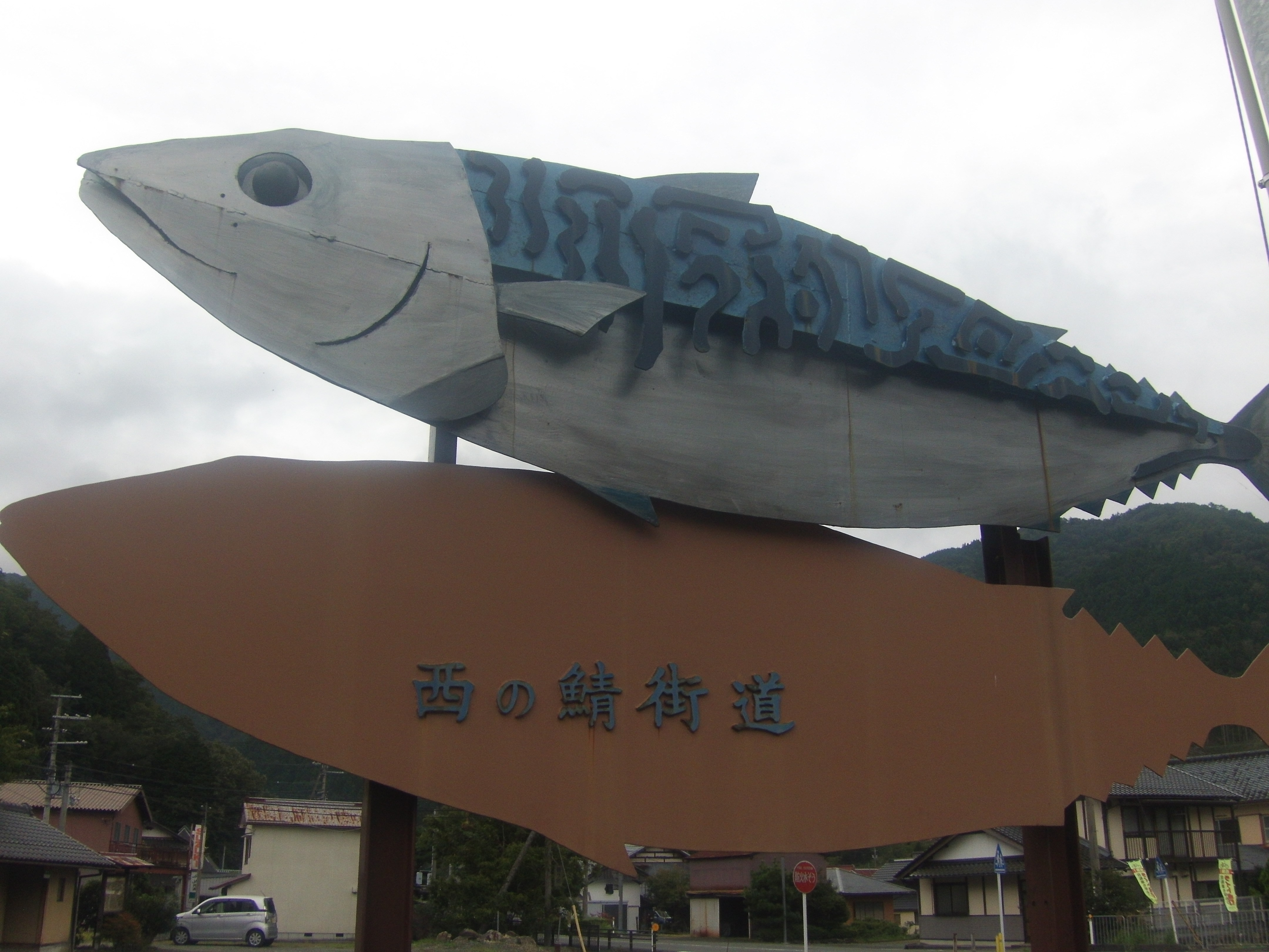 南丹市美山町鶴ケ岡にて